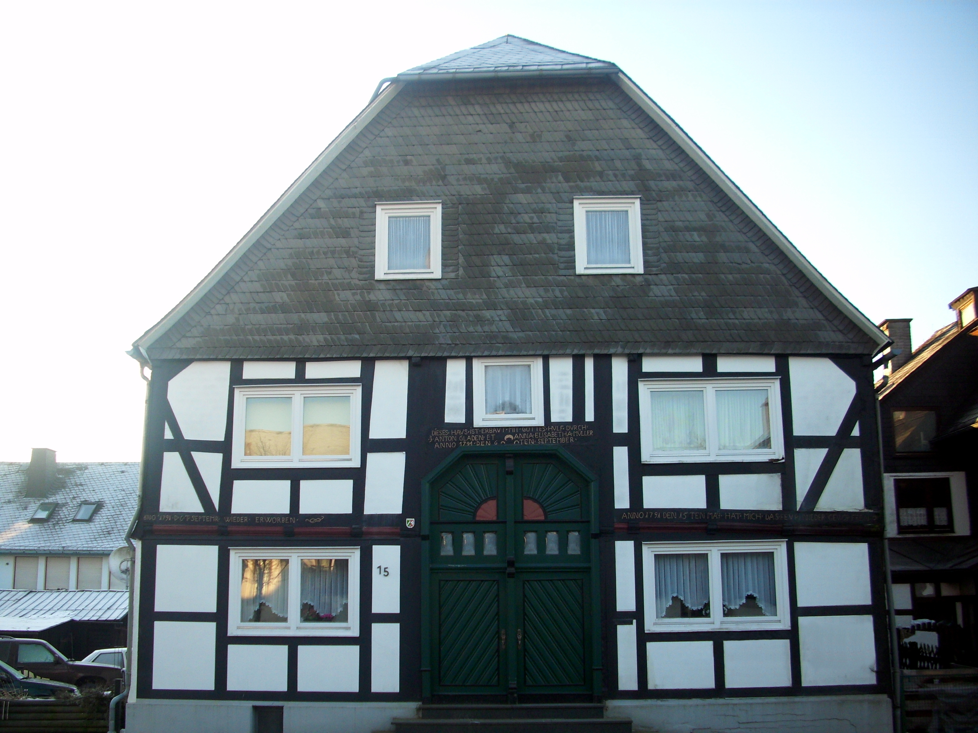 Fachwerkhaus von 1791 in Winterberg (Hochsauerlandkreis)